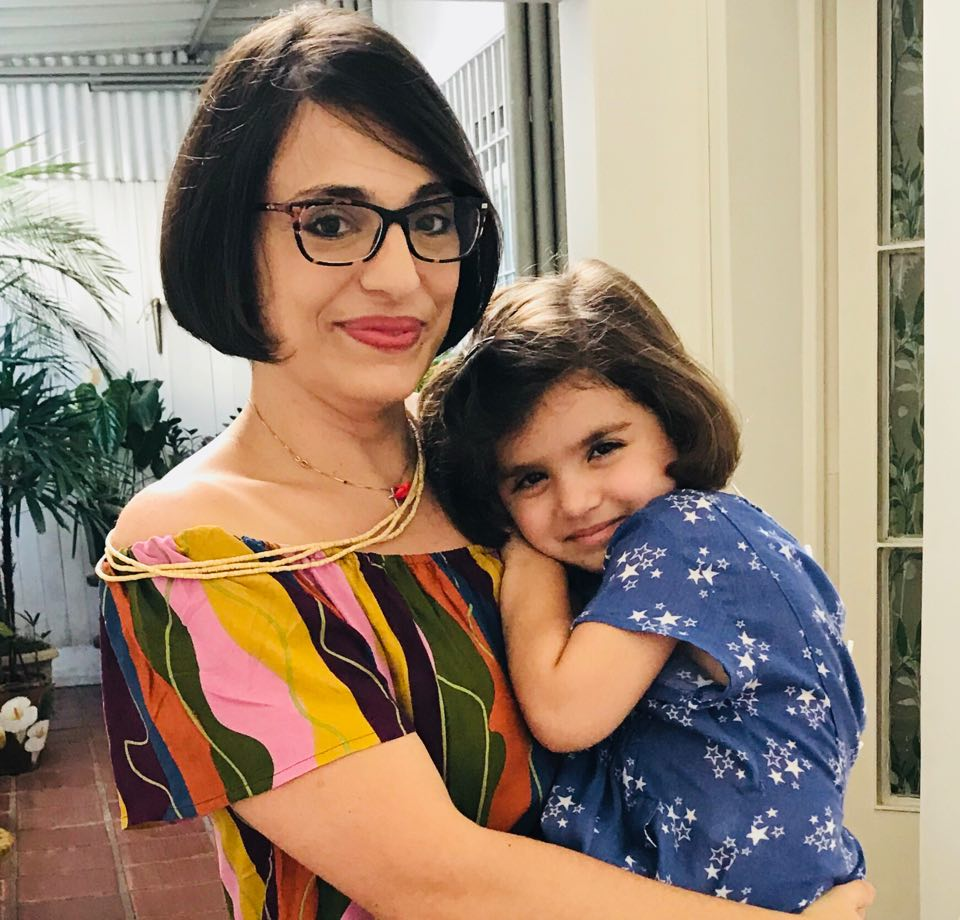 mariana ianelli e yolanda